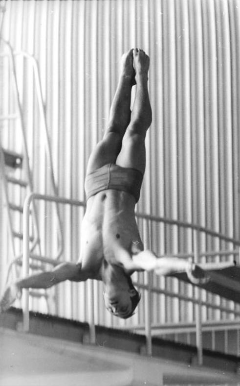 Falk Hoffmann ADN-ZB Gahlbeck 16.4.1972 Leipzig: DDR-Meisterschaften im Kunst- und Turnspringen- Beim Wettbewerb der Herren im Kunstspringen vom 3-m-Brett wurde am 15. April 1972 Falk Hoffmann DDR-Meister.